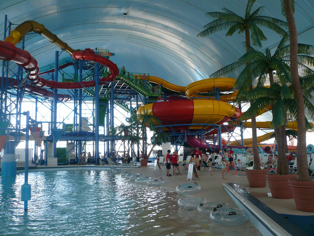 Slides Fallsview Water Park